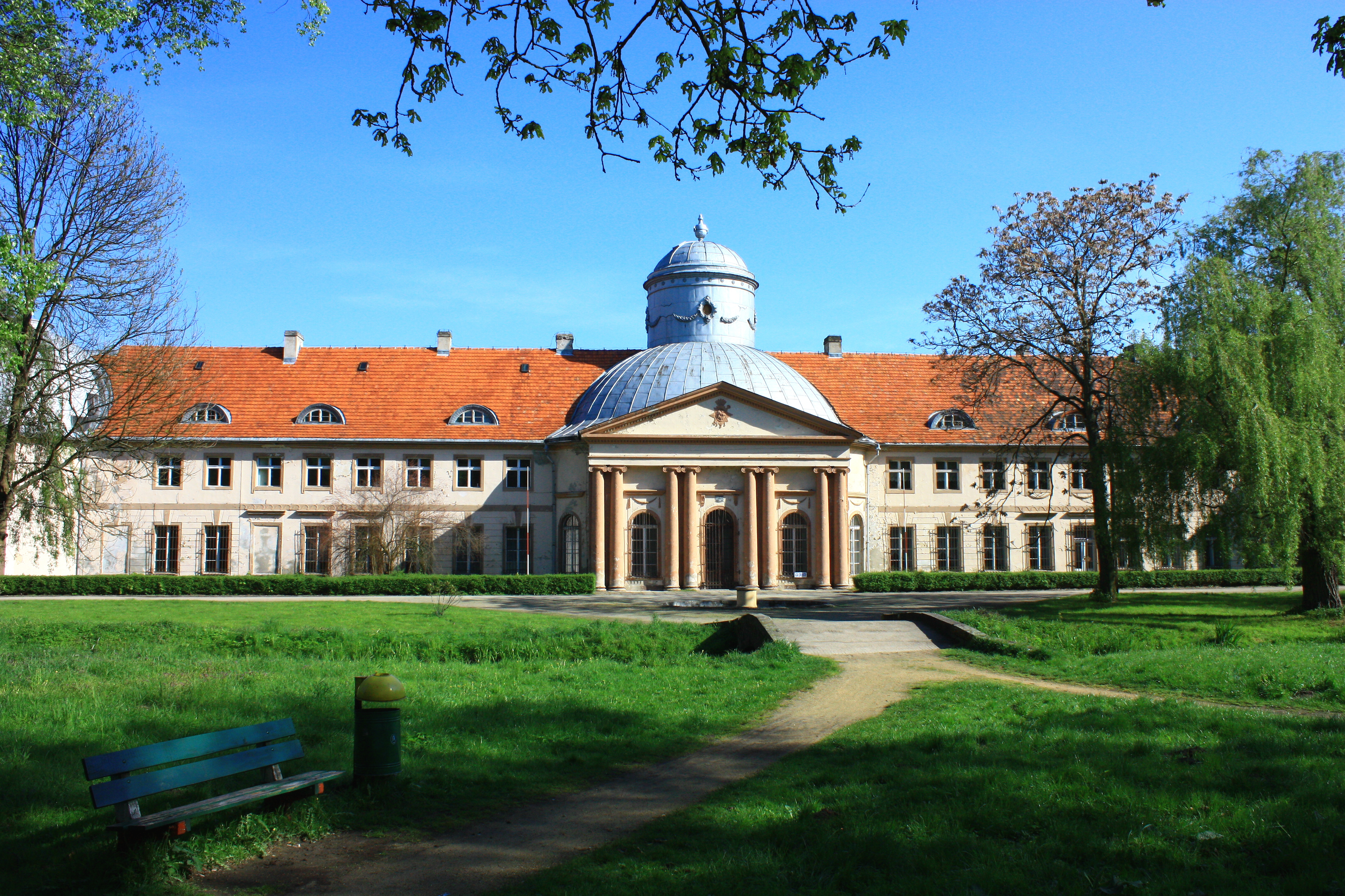 Milicz, pałac Maltzanów z domem zajezdnym, 2 poł. XVIII